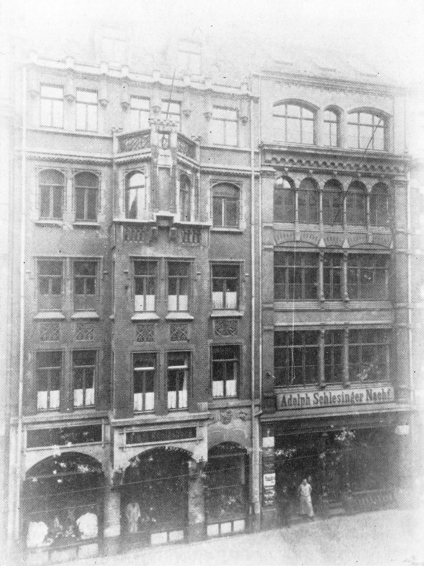 Richard König, Rauchwarenhandlung. Brühl 64/66 in Leipzig waren beides eigene Häuser der Firma. Seit dem Jahr 1903 war das von Robert Schlesinger gegründete Rauchwaren-Handelsunternehmen im Besitz eines Richard König. Richard I., der Großvater des späteren Inhabers (75-jähriges Jubiläum 1978) hat seinerzeit allein chinesische Artikel für jährlich über eine Million Pfund eingekauft. 1910 betrug sein Vermögen eine Million Goldmark. Richard II., sein Sohn, machte nach dem 2. Weltkrieg ein Riesengeschäft mit Opossum. Richard III. (* 20. August 1928 in Leipzig), der Enkel, erweiterte das Geschäft beständig.